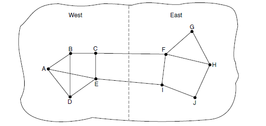 Şəkil 3. Şərq və Qərb hissələrinin iki bağlantı ilə bir-birinə bağlandığı şəəbəkə